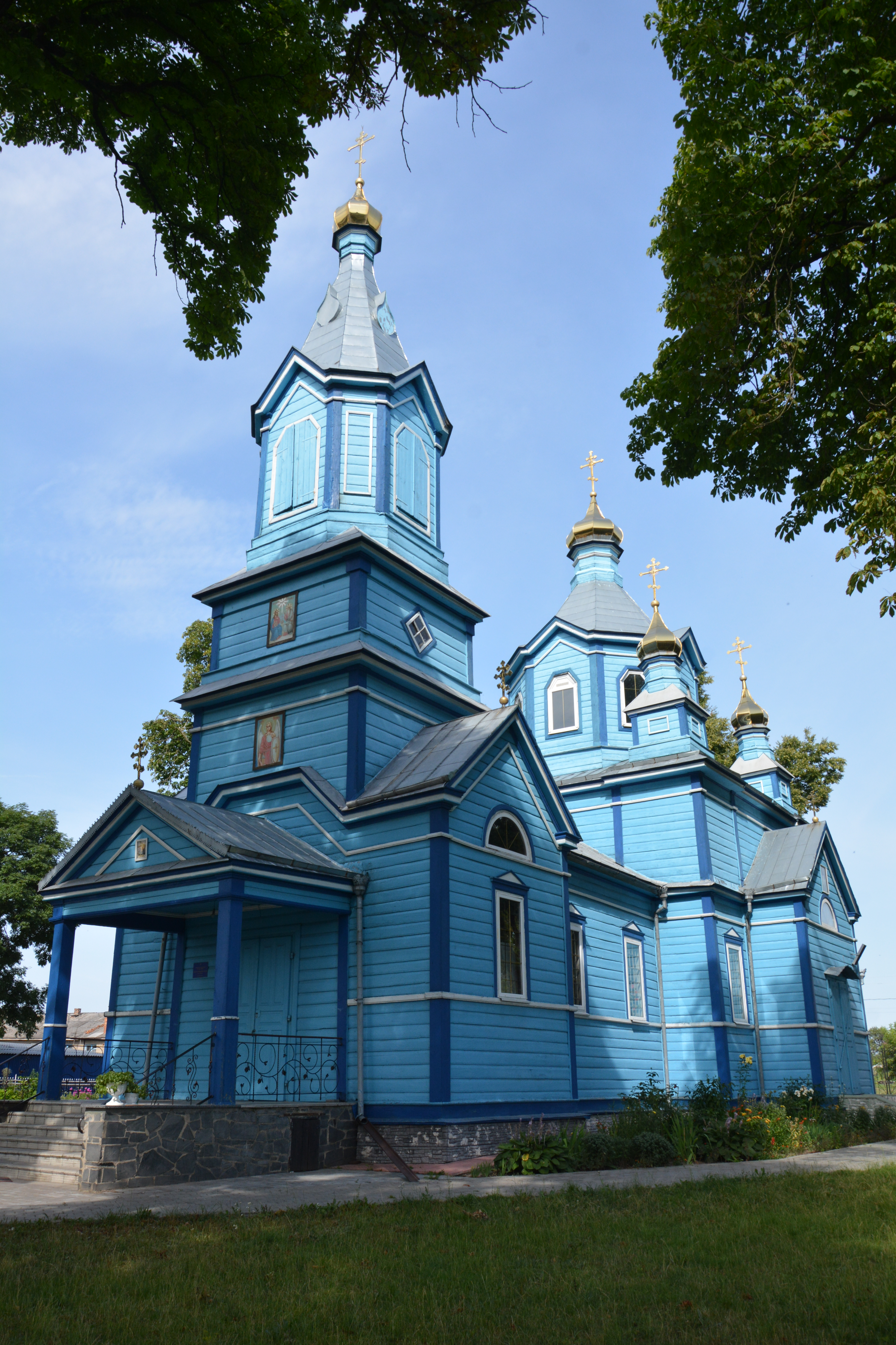 Троїцька церква (дер.), Олика